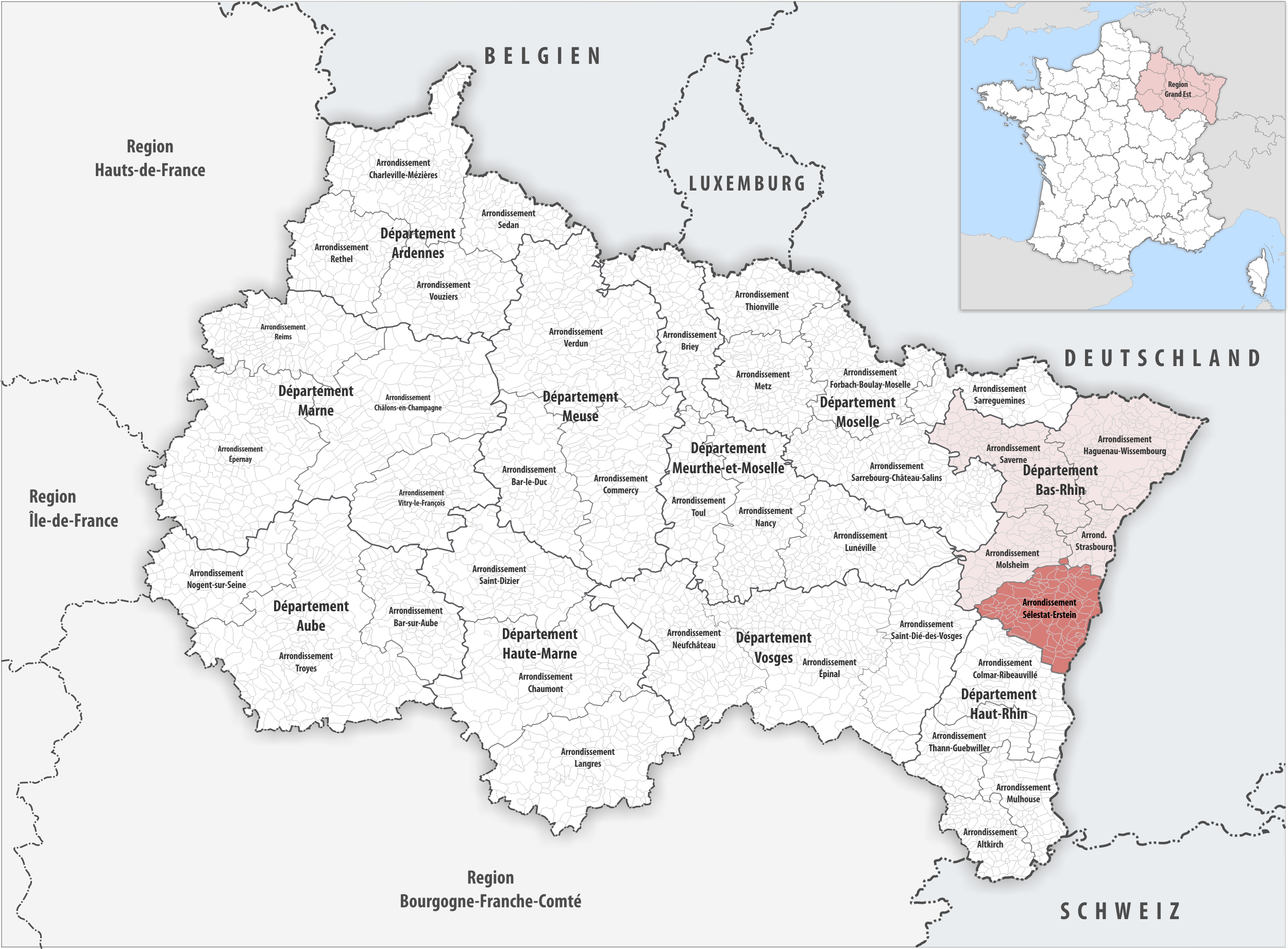 Lage des Arrondissements Sélestat-Erstein